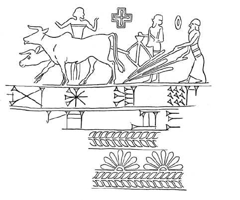 Sceau de la période kassite représentant une équipe de laboureurs conduisant un araire. Extrait de A. T. Clay, Documents from the Temple Archives of Nippur Dated in the Reigns of Cassite Rulers, PBS 2/2, Philadelphie, 1912, p. 66